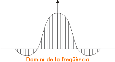 Dos polsos.